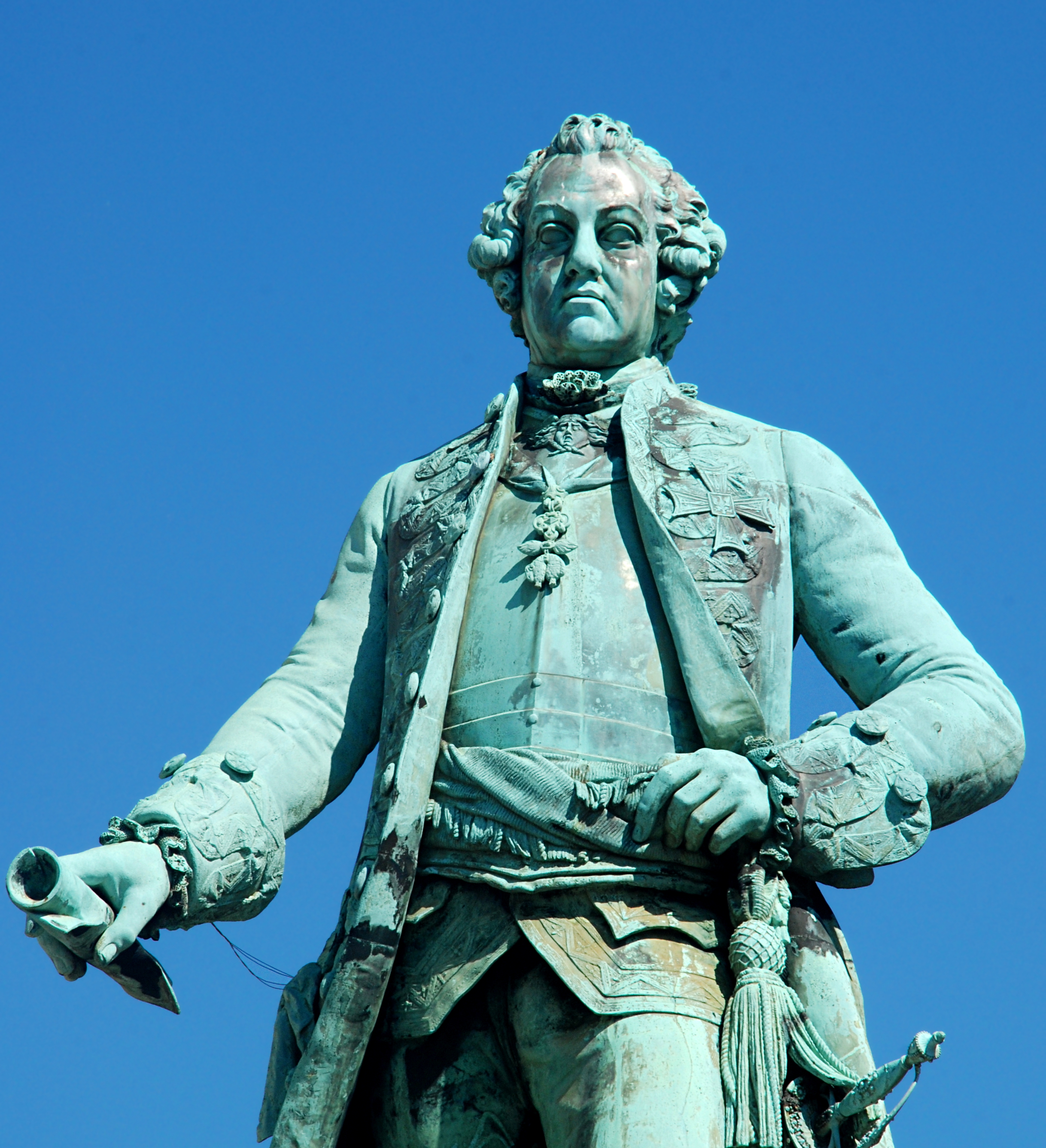 Belgique - Bruxelles - Place du Musée - Statue de Charles de Lorraine